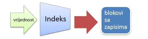 Indeks koji pokazuje na blokove zapisa